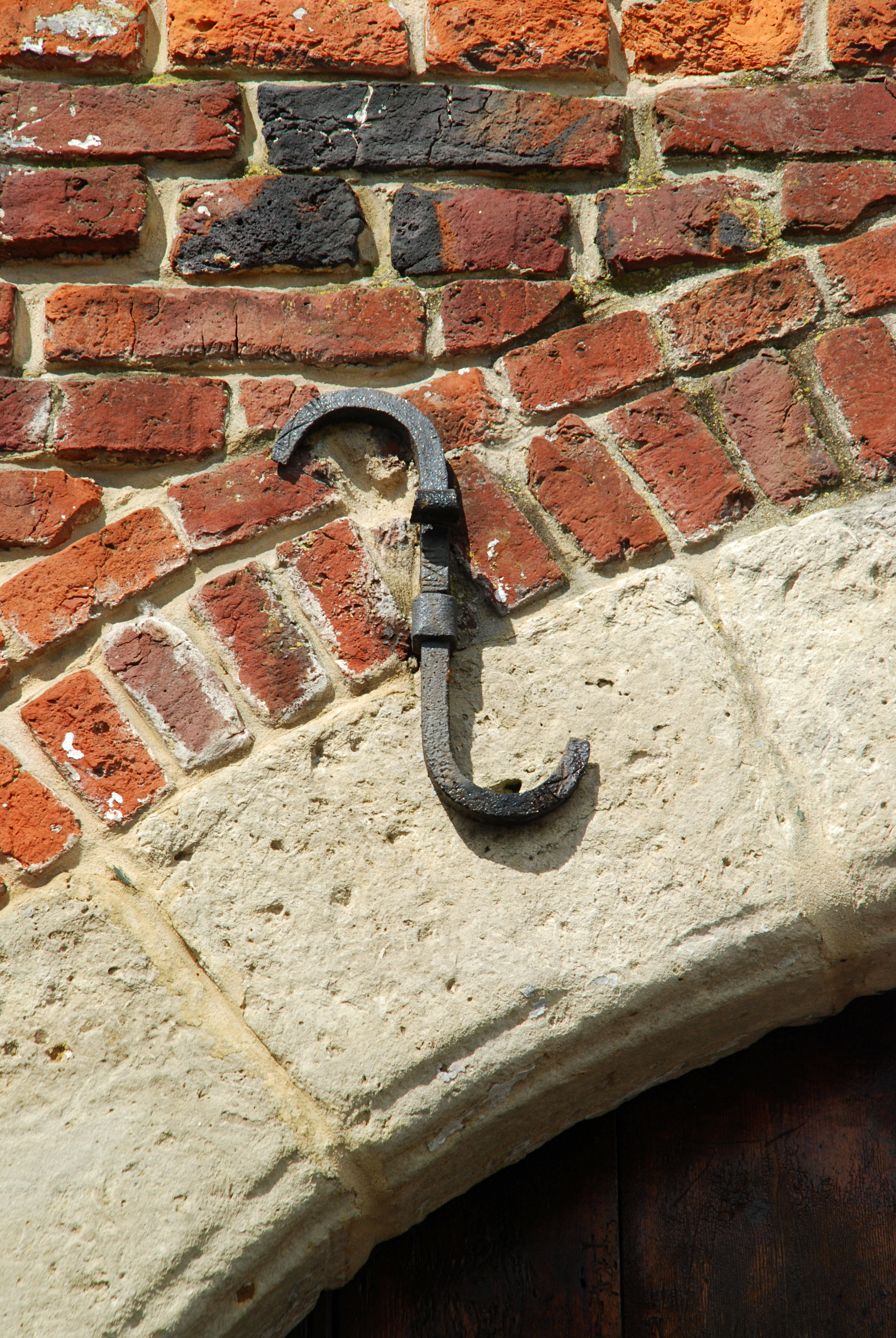 Belgique - Brabant wallon - Ottignies - Manoir de Franquenies